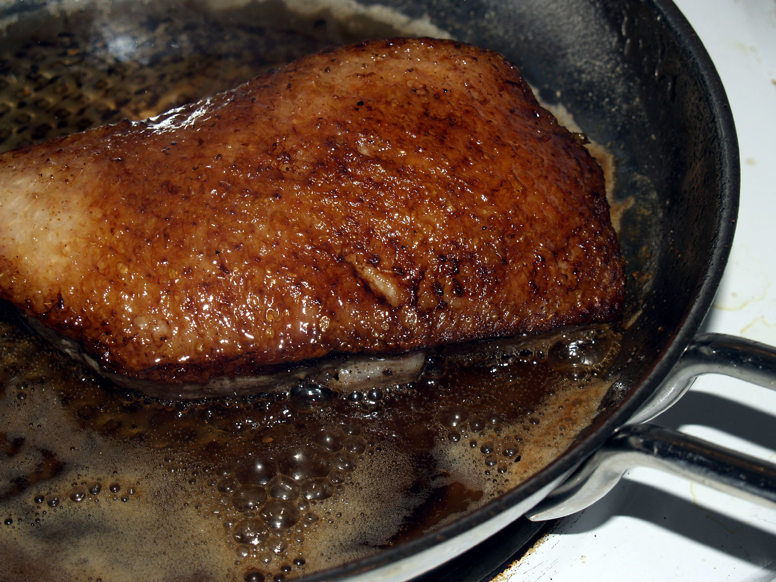 Andebryst